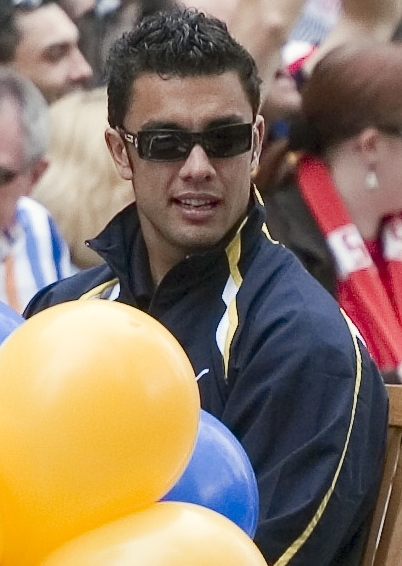 Daniel Kerr